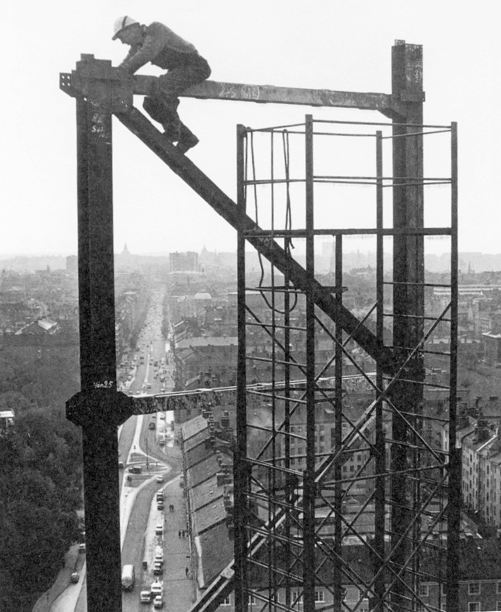 Torsten Andersson född 26 i Vik Söderbykarl, sätter fast översta balken på Wenner-Gren Center under byggnad 1959